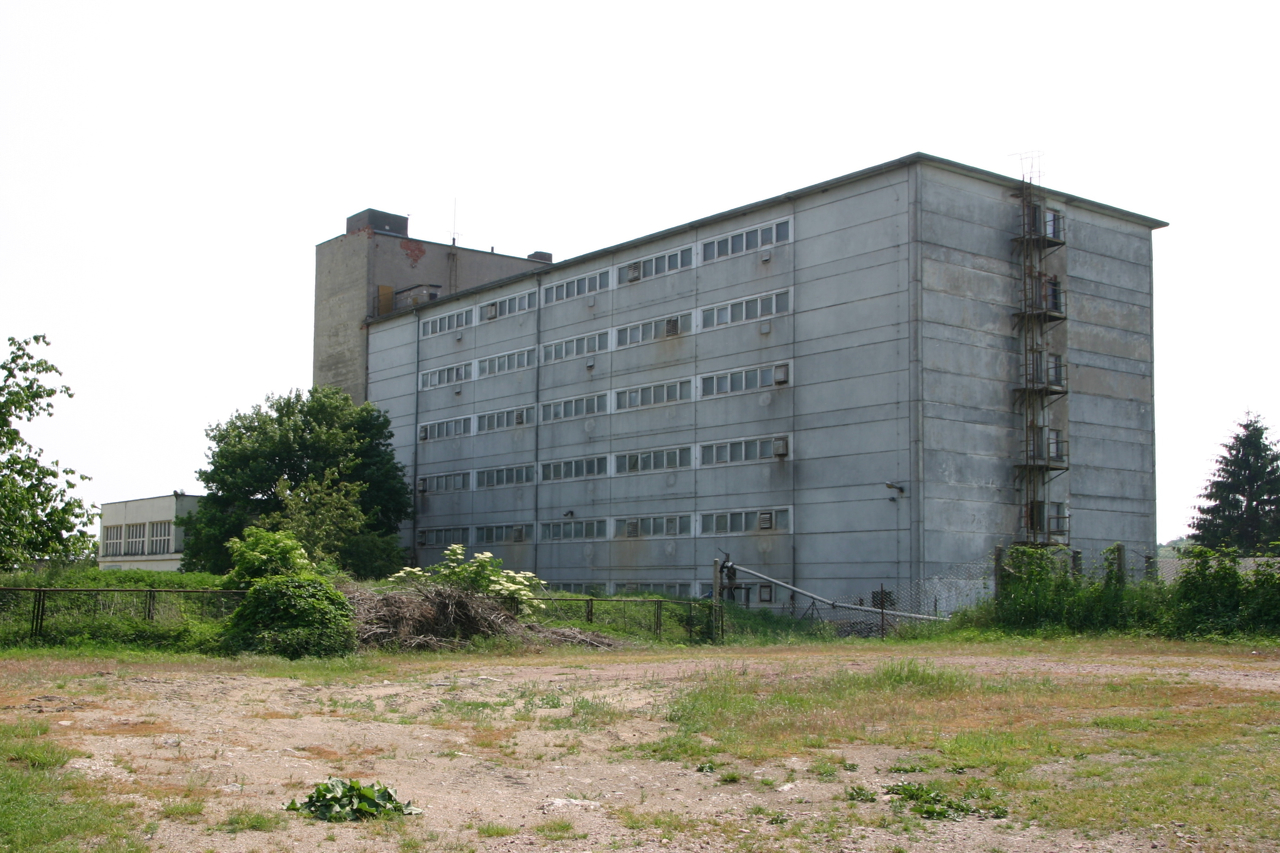 Das "Schweinehochhaus" in Maasdorf (Südliches Anhalt)